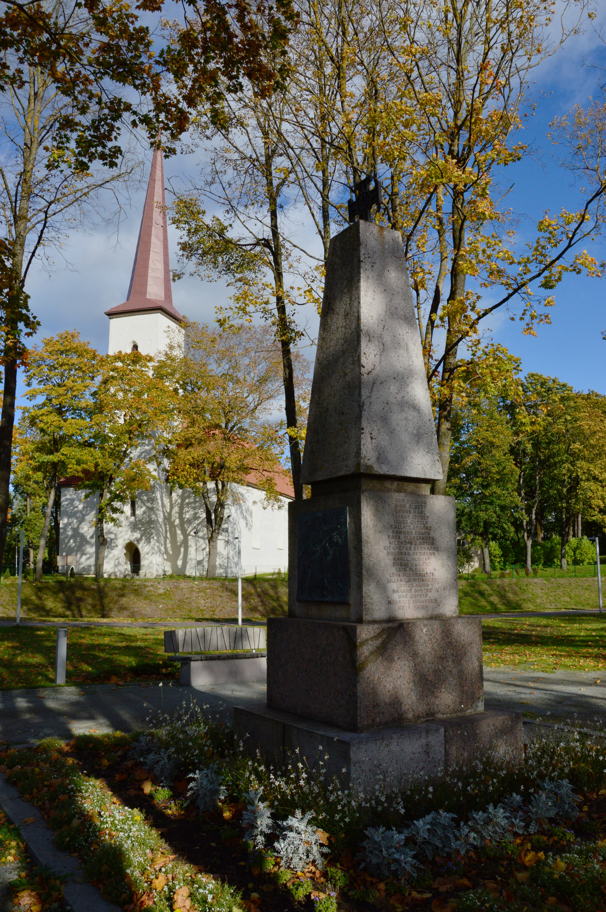 Jõhvi Vabadussõja mälestussammas